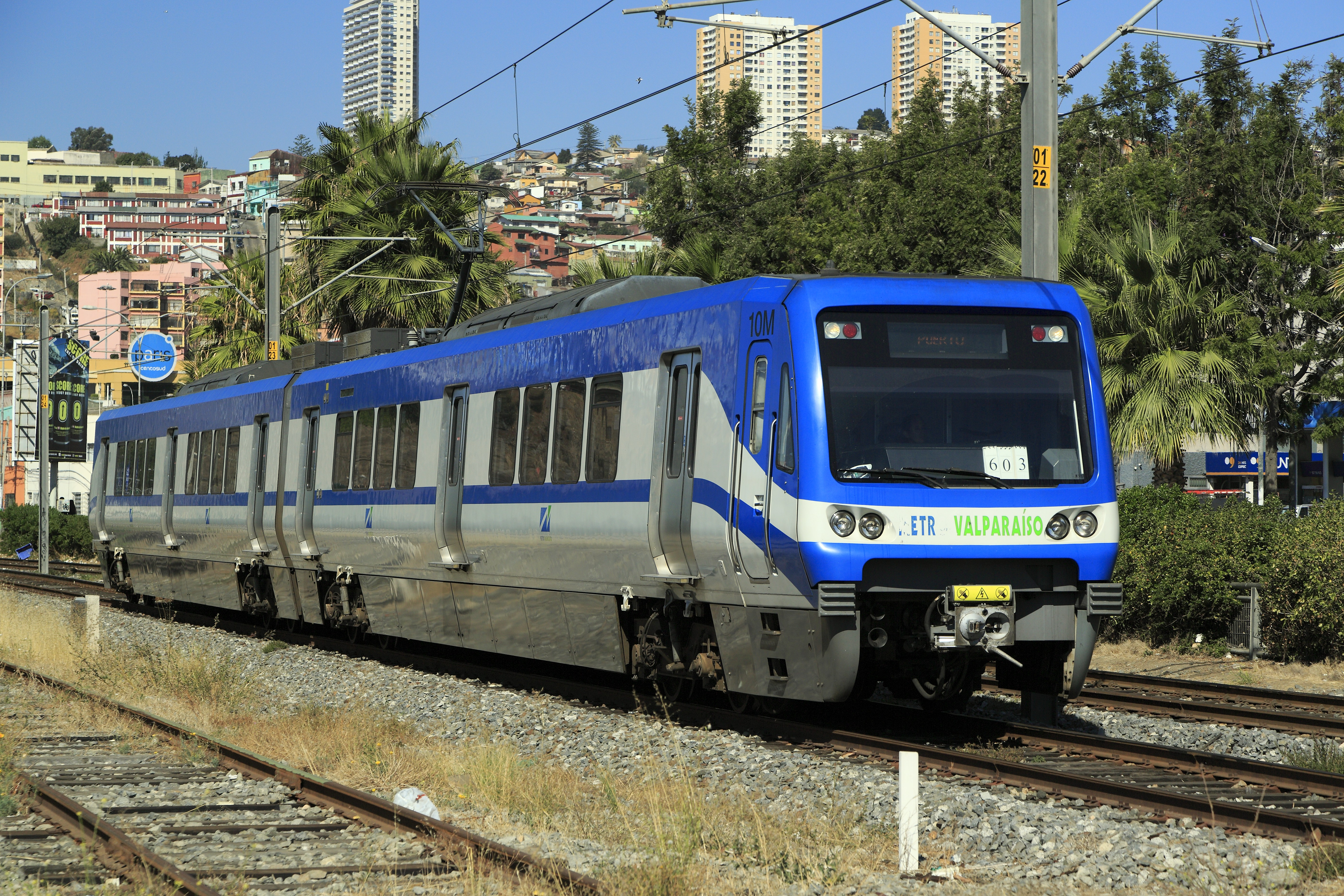 Zug Richtung Puerto vor dem Wegübergang zwischen den Hp Francia und Barón, das Gleis im Vordergrund links ist ein zusätzliches Güterzuggleis für den Verkehr zum Hafen. Wie intensiv genutzt sieht es nicht aus, allerdings sind Güterzugfahrten ohnehin nur in der Betriebspause der Metro möglich.In der Woche verkehren die Triebwagen einzeln und als Doppeleinheit, doch eine Regel ist nicht zu erkennen.